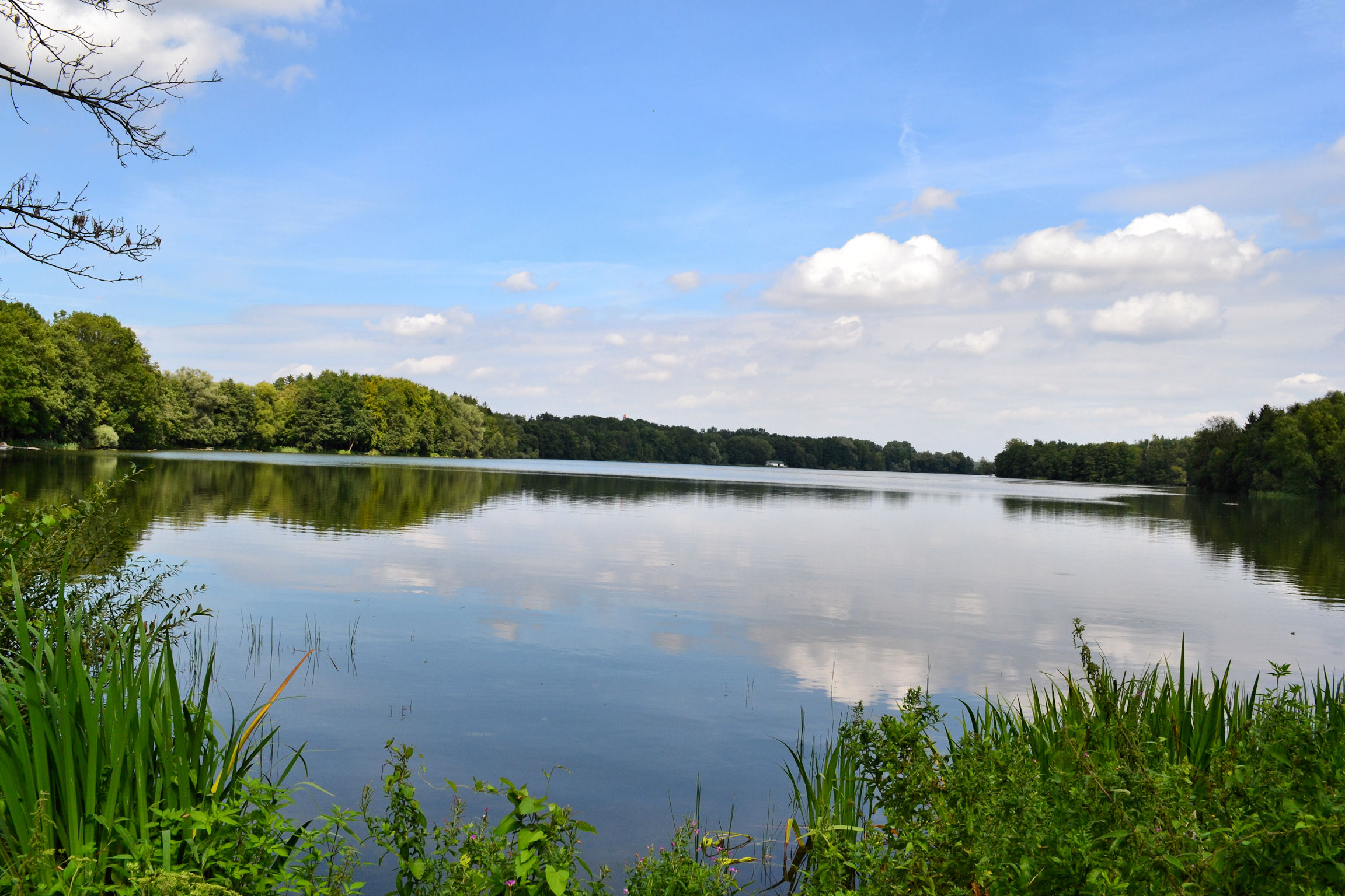 Jezioro Morzycko